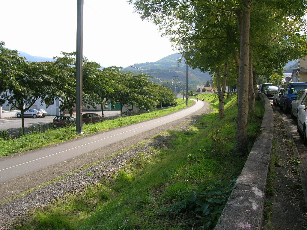 Parte del tracciato presso Soum a Lourdes trasformato in pista ciclabile